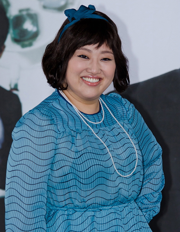 2011년 6월 7일 OCN 드라마 '신의 퀴즈 시즌 2' 제작발표회에서